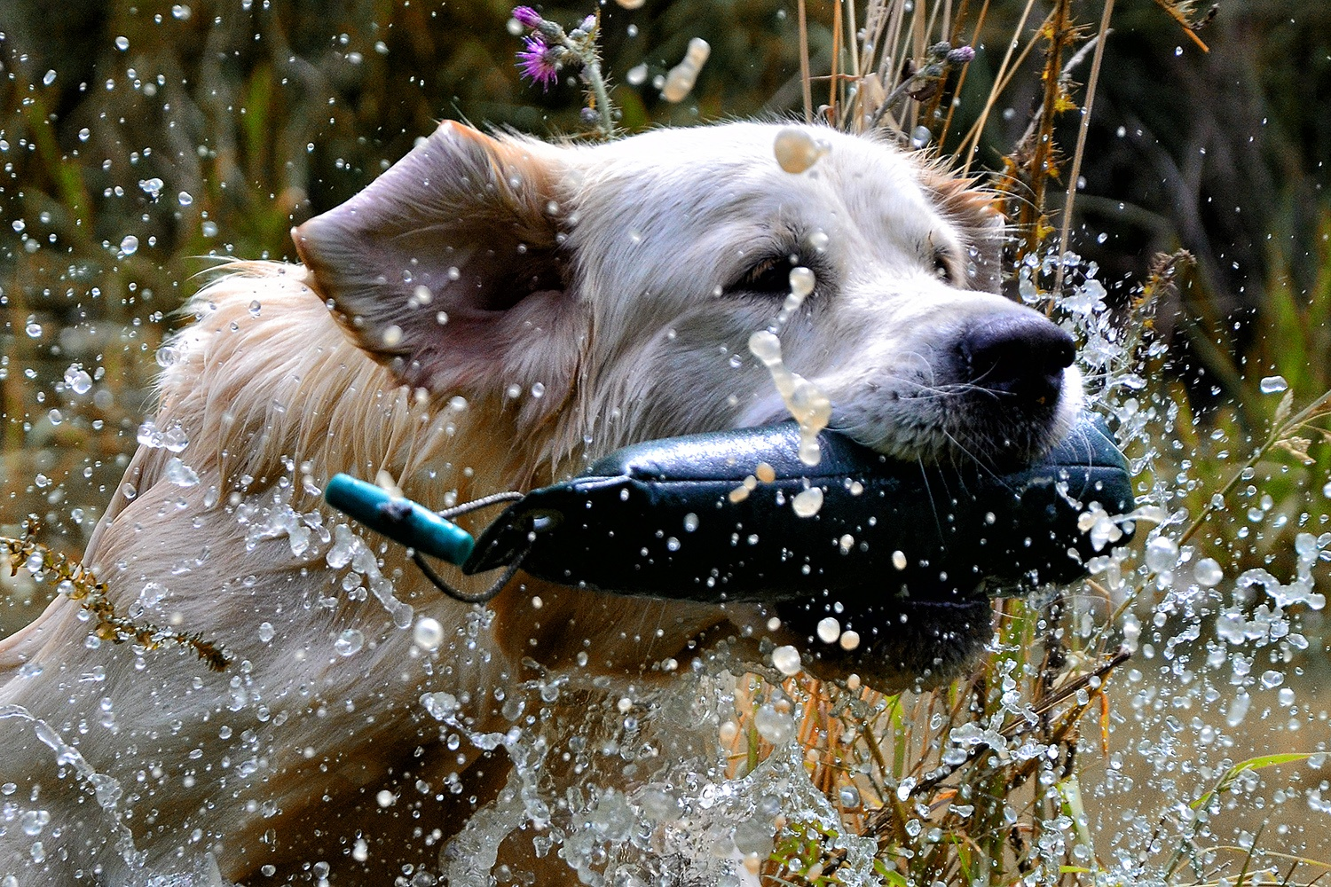 Golden Retriever bei der Dummy-Arbeit